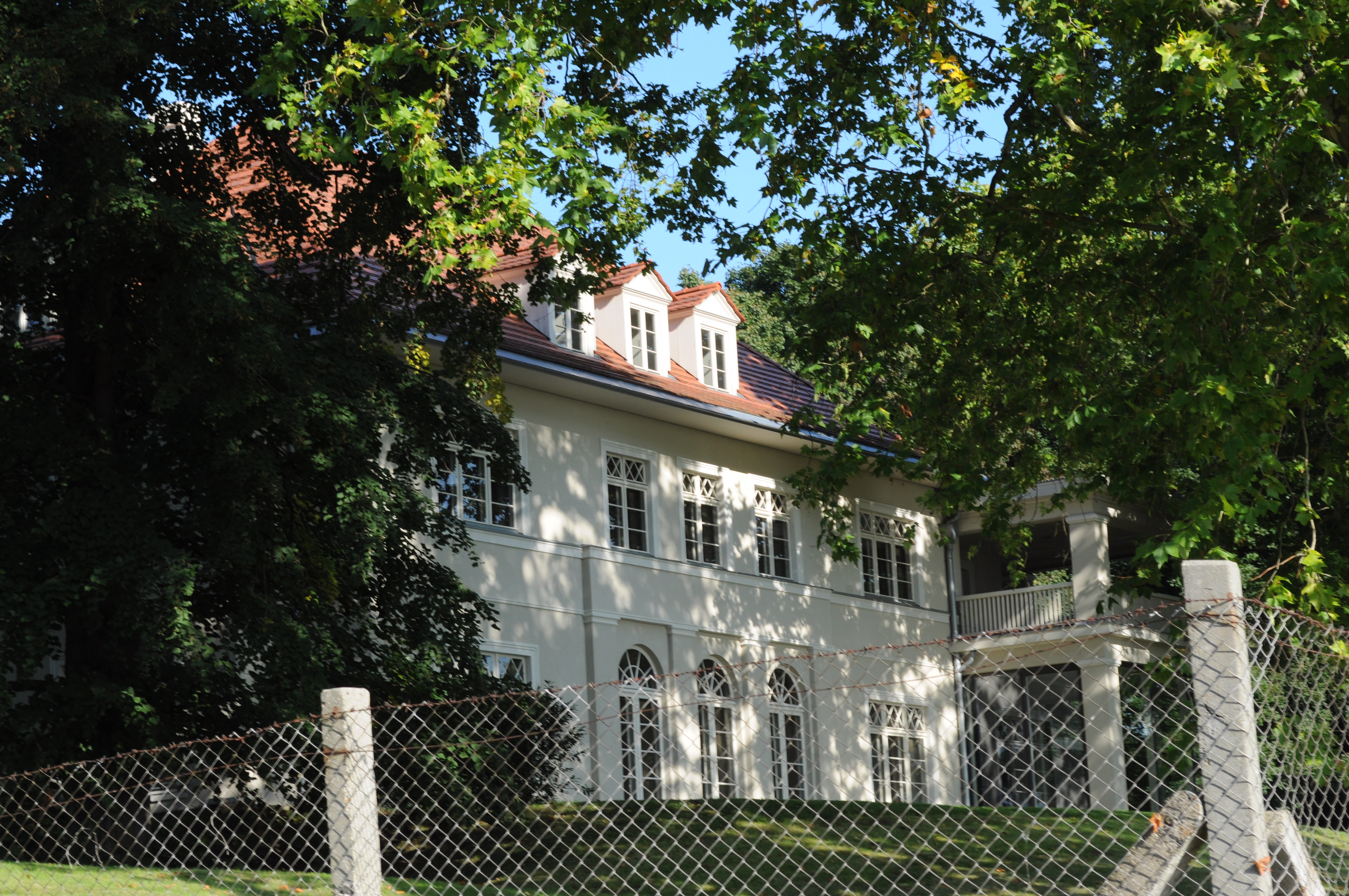 Villa Starck, Potsdam, Bertinistrasse, 2012